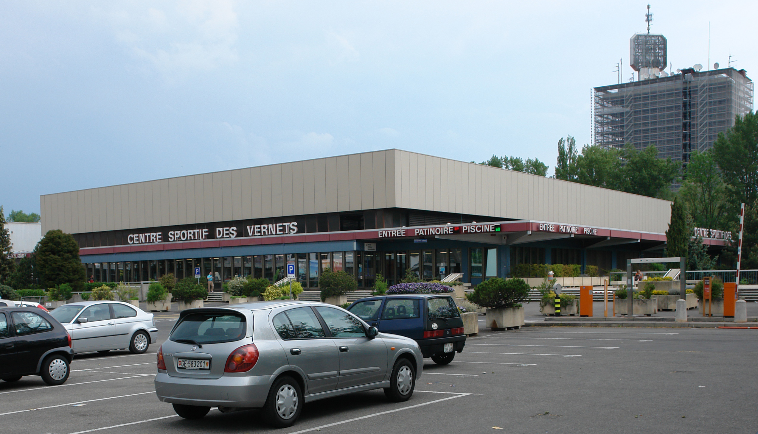 Les Vernets in Geneva, Switzerland, Swimming Stadium Architect: Cingria+Maurice, Year: 1958-66